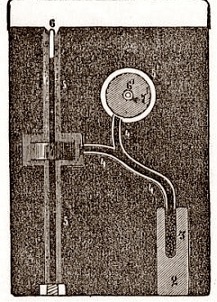 Schema del proiettile esplosivo ideato da Nikolaj Kibal'cic